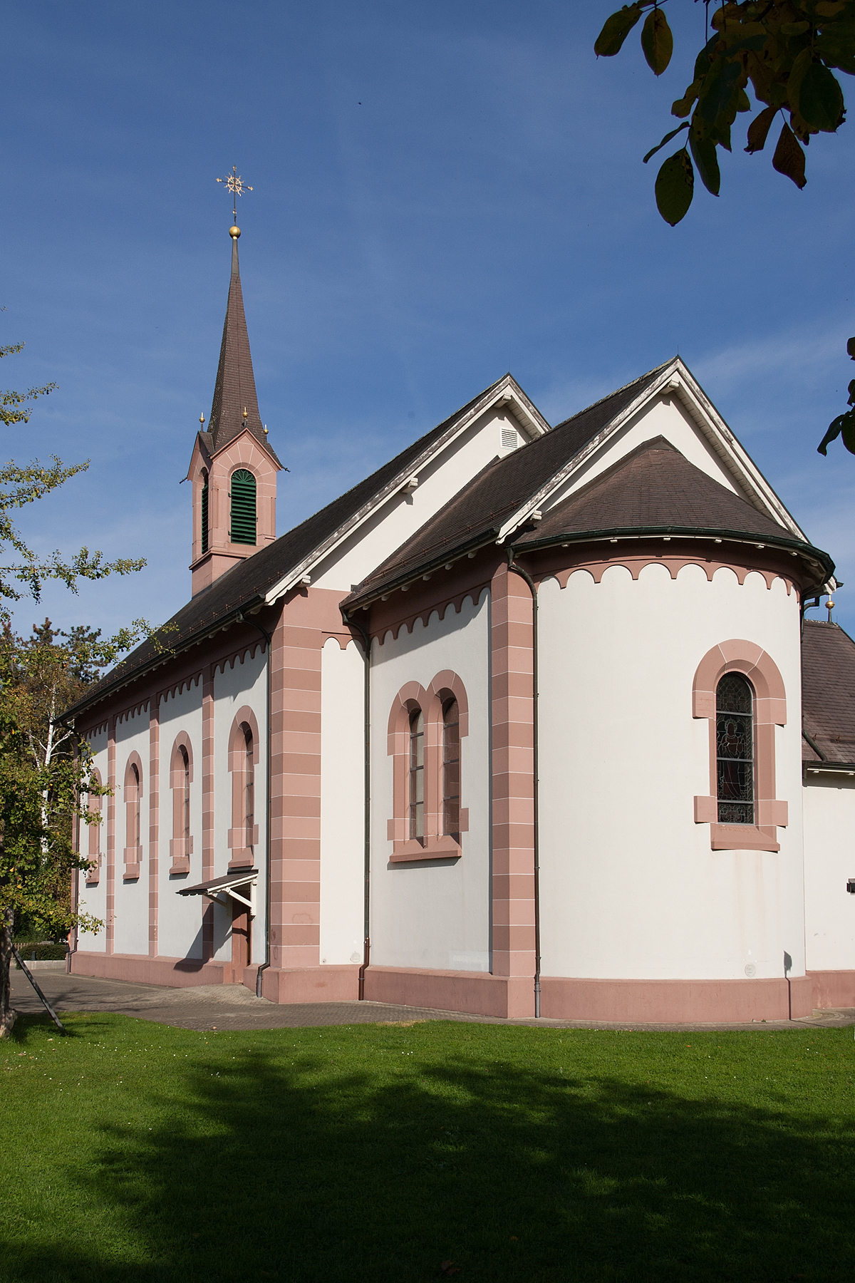 Römisch-Katholische Kirche in Sissach (BL)